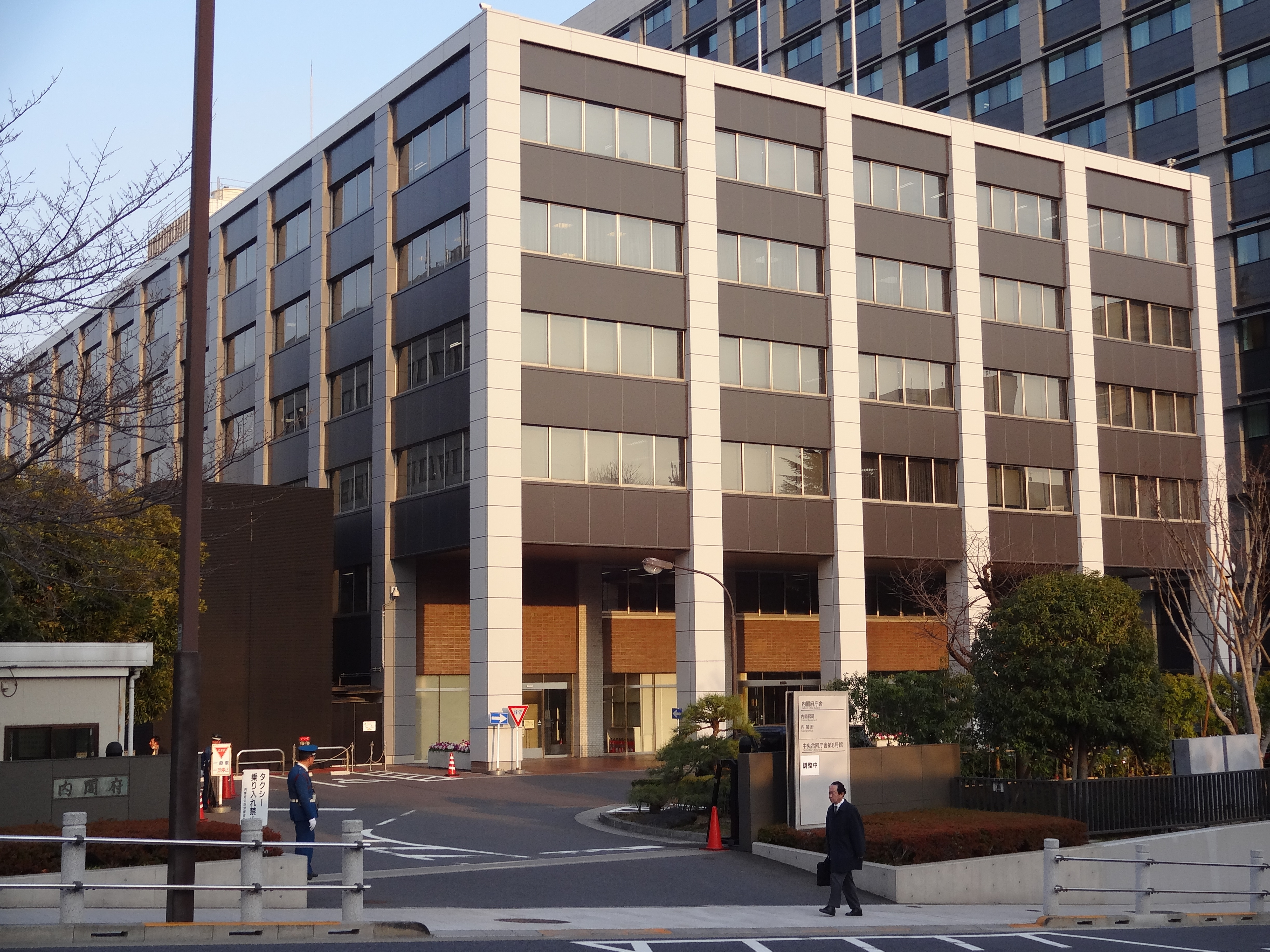 内閣府庁舎の外観。